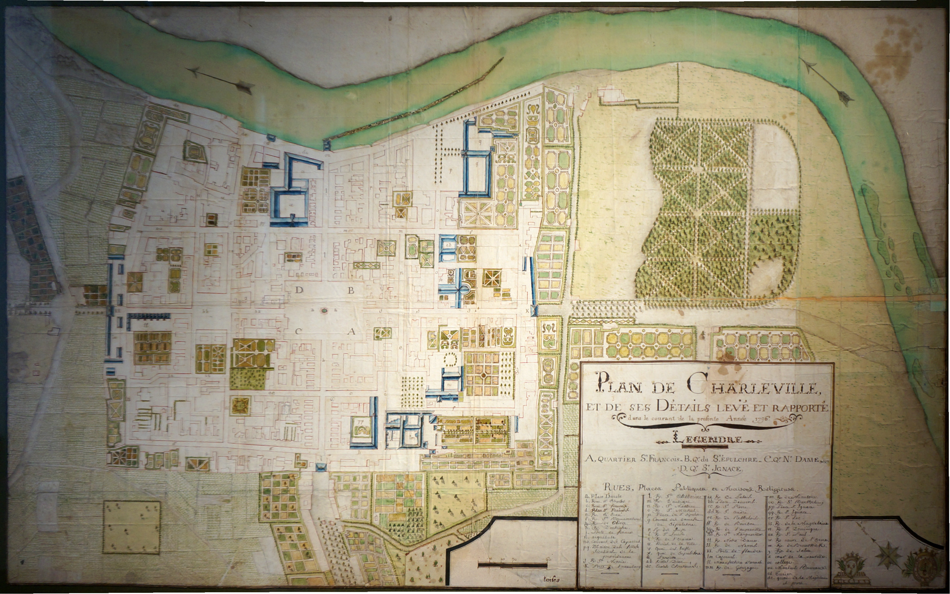 Charleville_1796_plan_Legendre.